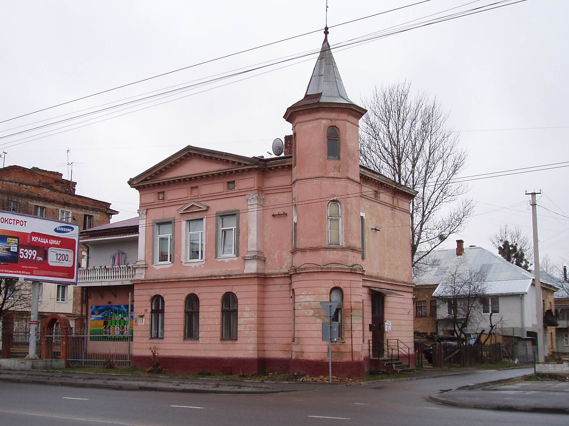 Вілла кінця XIX ст. у Львові на вулиці Кульпарківській, 114. Руст першого ярусу вежі було втрачено близько 2014 року.